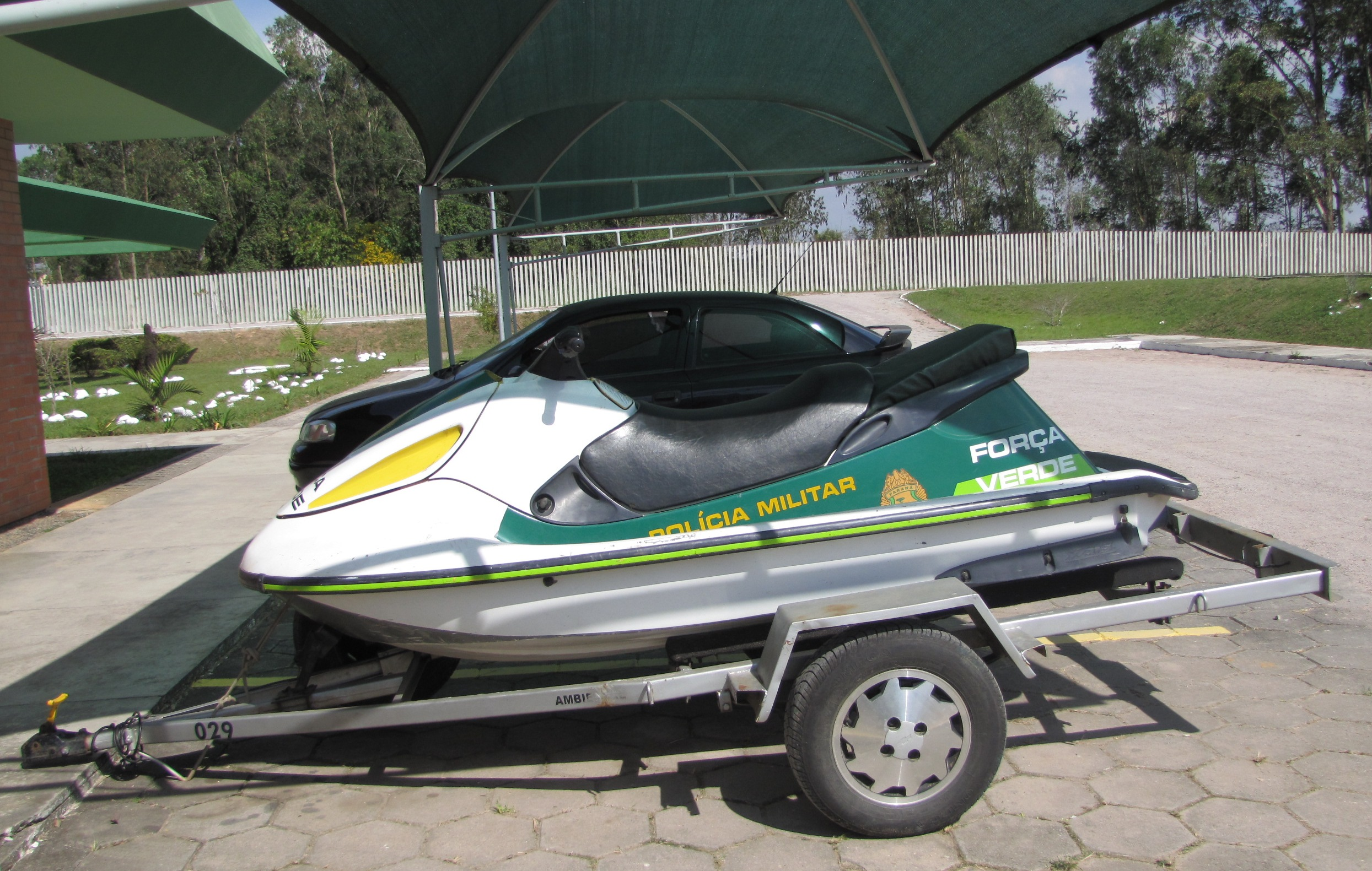 Moto aquática do Batalhão de Polícia Ambiental da PMPR.